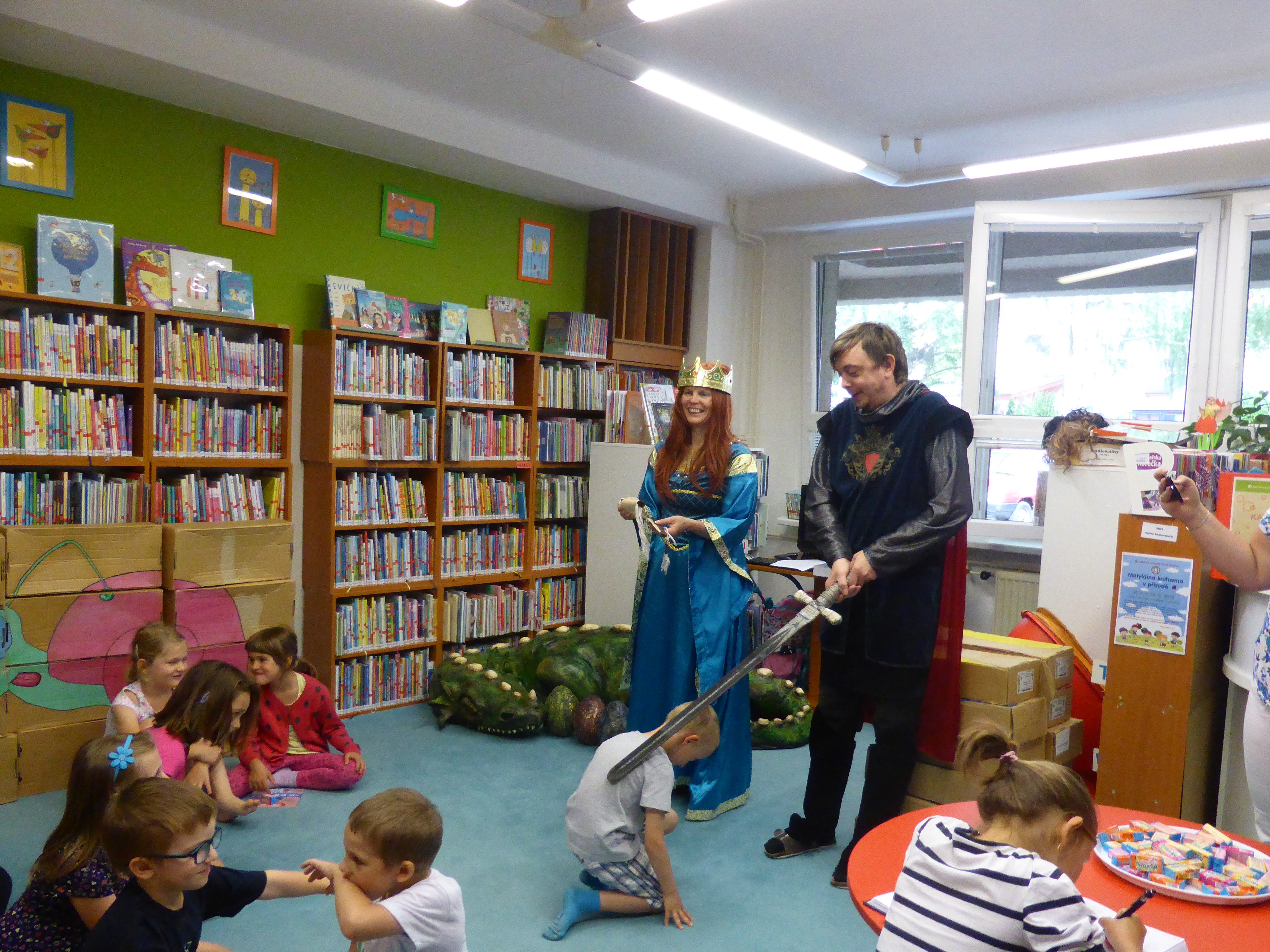 Projekt Knížka pro prvňáčka. Slavnostní pasování prvňáčků na čtenáře.